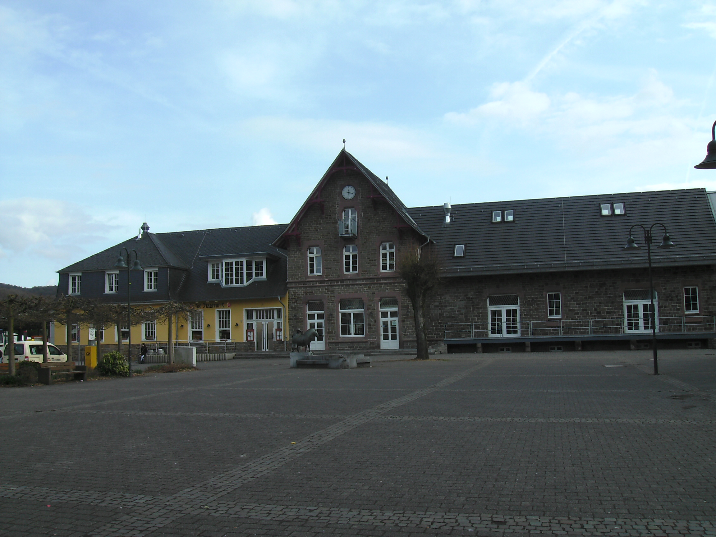 "Kulturbahnhof" in 51491 Overath, Nordrhein-Westfalen